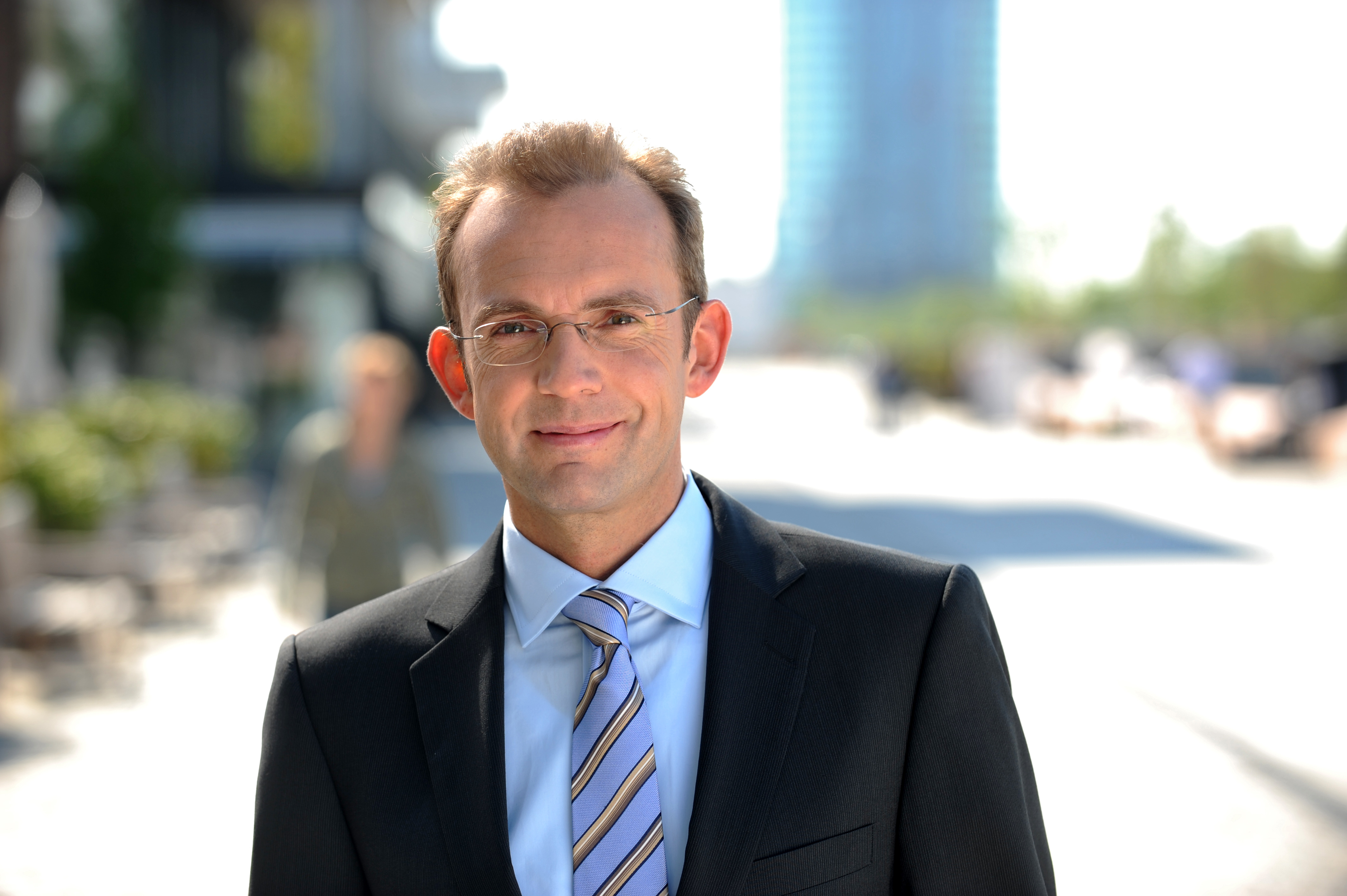 Thomas Röwekamp